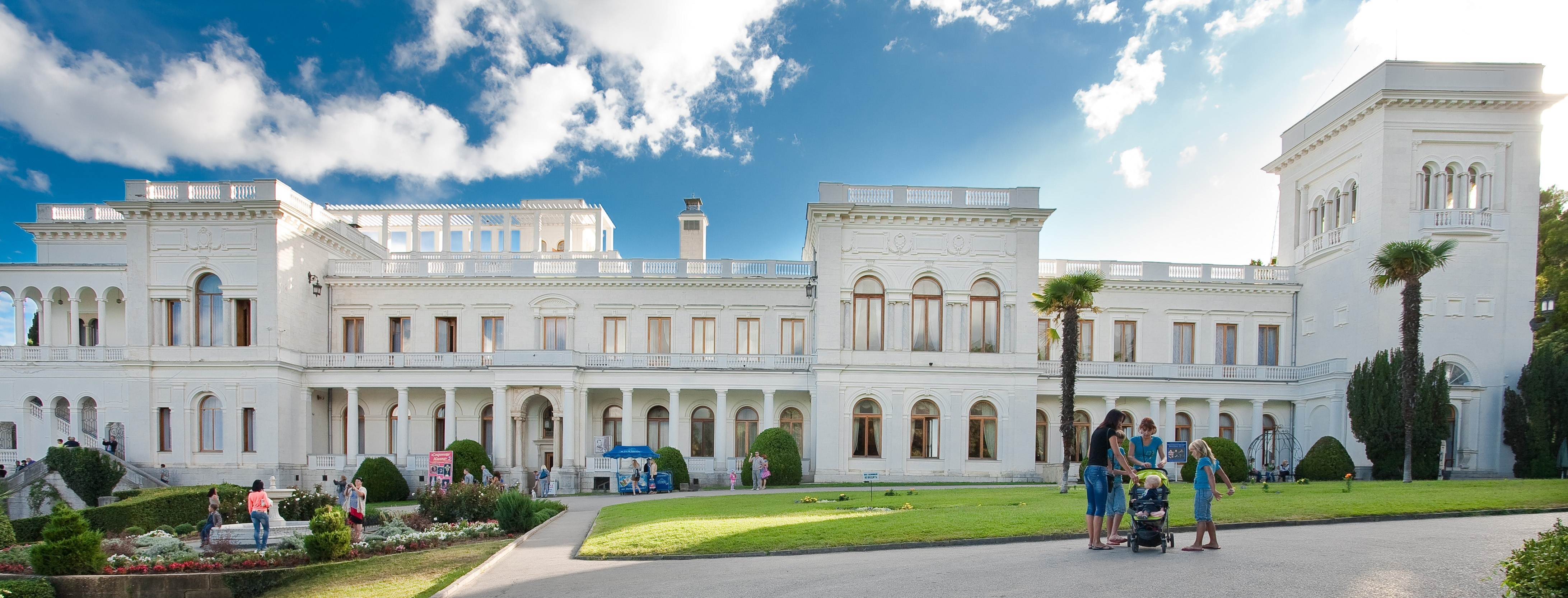 Лівадія вул. Батурина, 44